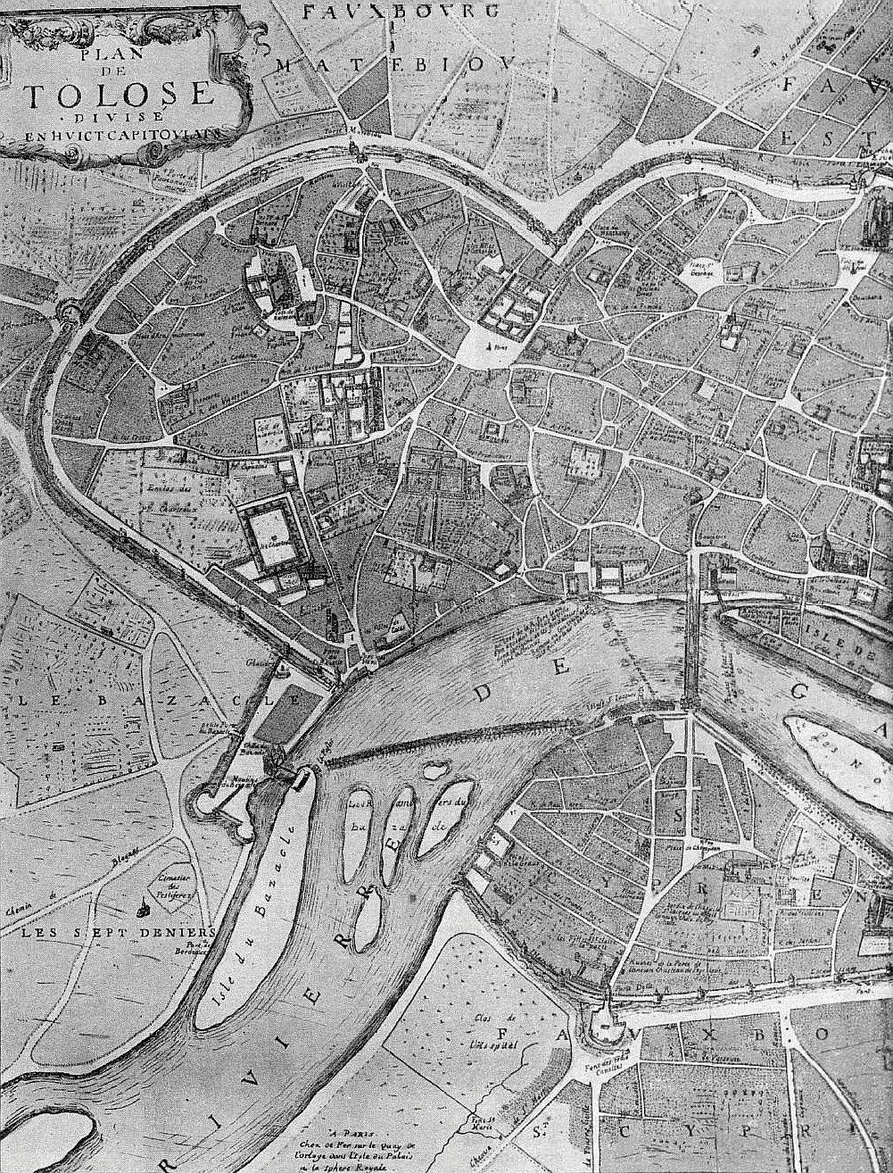 Plan du vieux quartier latin de Toulouse (aux archives municipales).